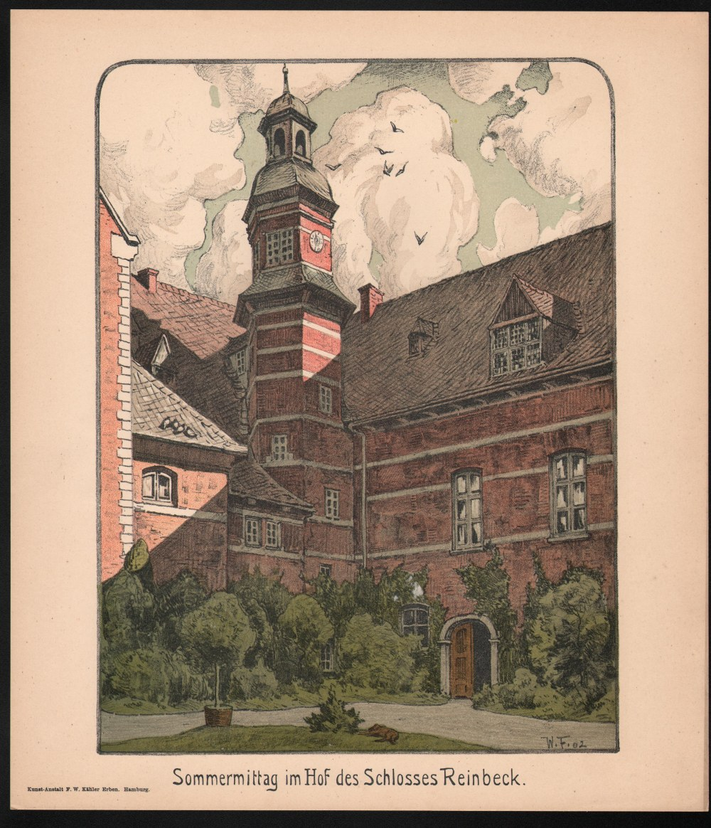 Heimat. Im Sachsenwald. Blatt 4 Sommermittag im Hof des Schlosses Reinbeck